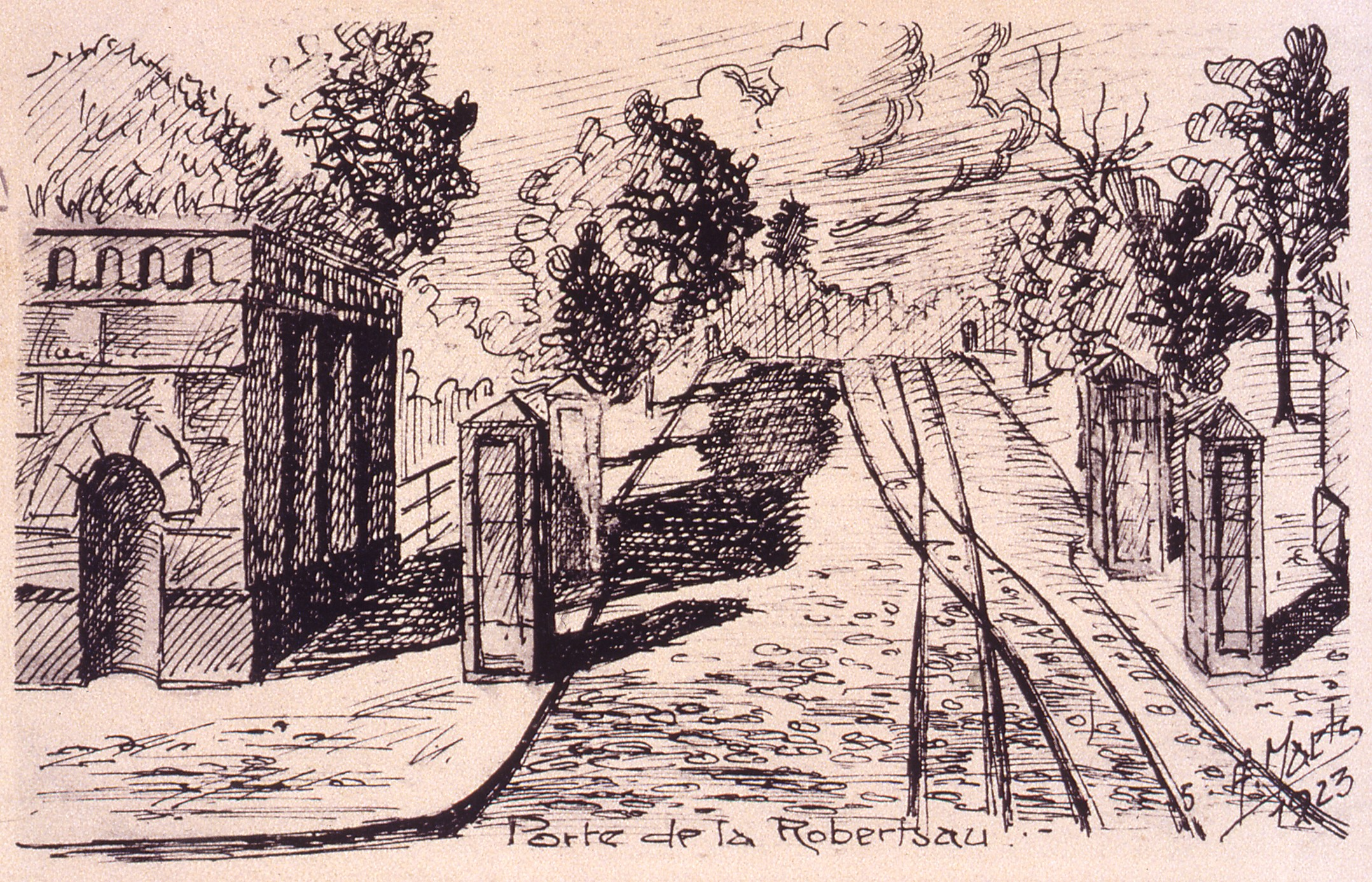 Dessin de la Porte de la Robertsau à Strasbourg